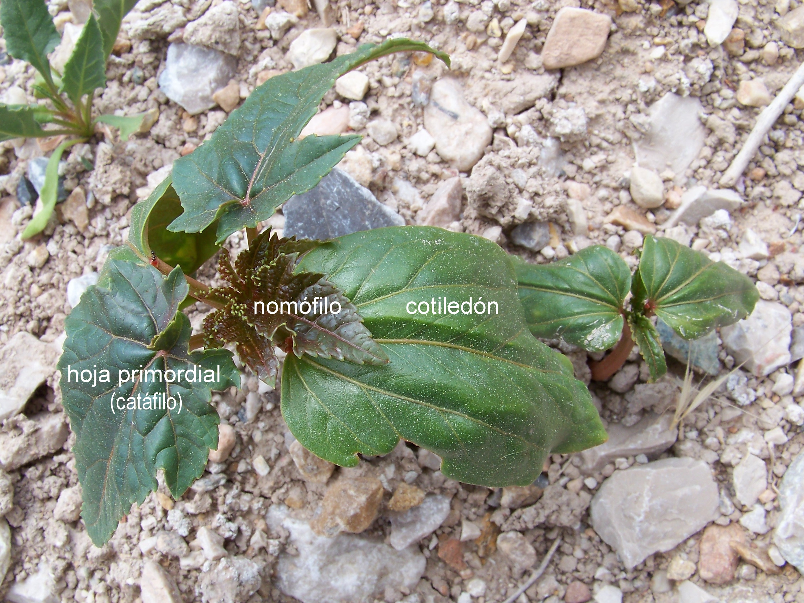 Primeros estadios de desarrollo de las hojas - de abajo hacía arriba : cotiledones, hojas primordiales (catafilos) y nomófilos en una plántula de Ricinus communis L. (dicotiledóneas) - Camino de la Azarbe de Patricio, Albatera (Alicante, España).